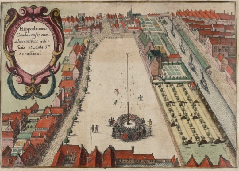 De Kouter of Paardenmarkt (Hippodroom) in de 1e helft van de 17e eeuw - Afbeelding uit Flandria Illustrata (1641)